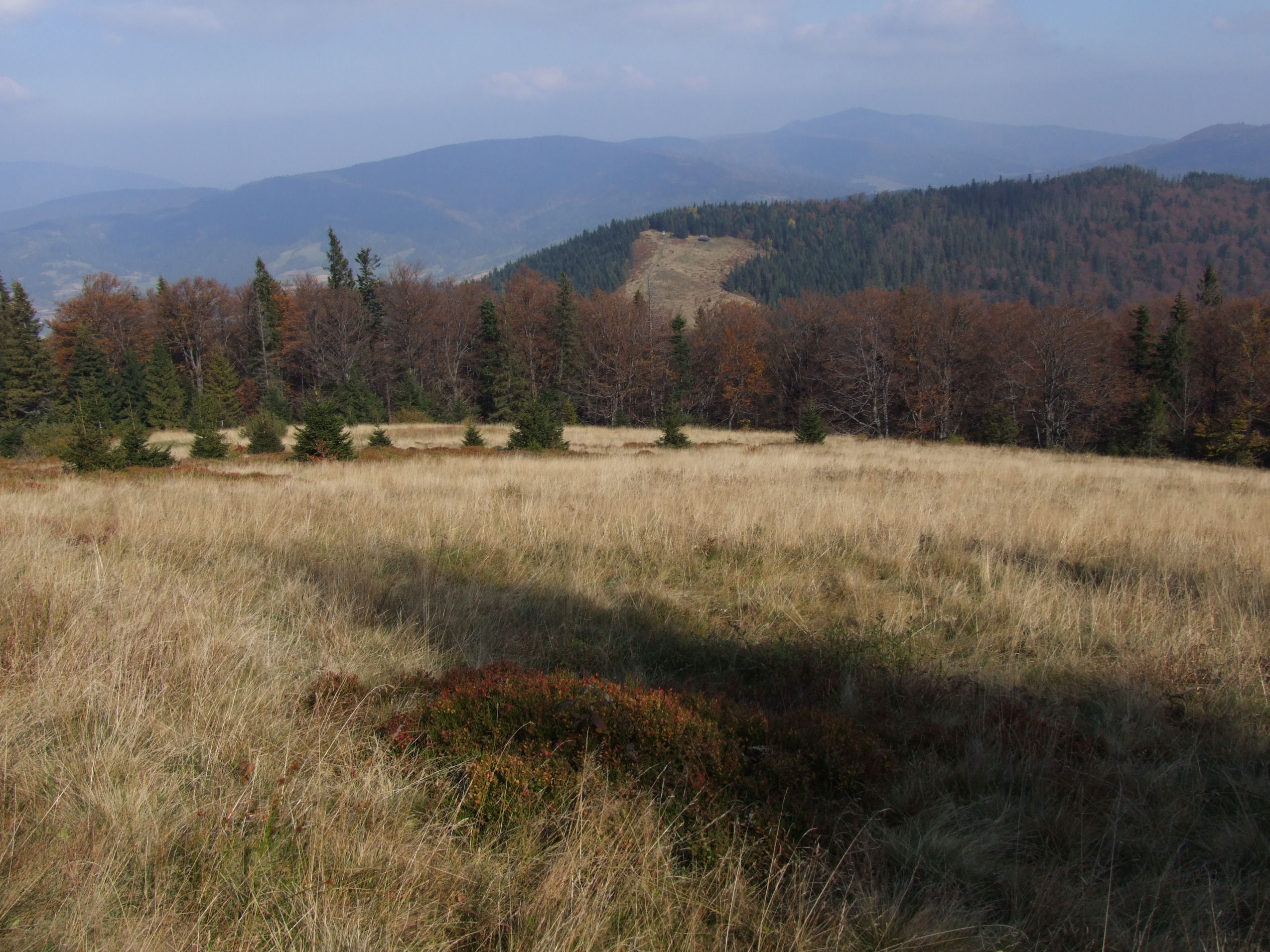 Polana Adamówka. Widoczna polana Podskały i Beskid Wyspowy